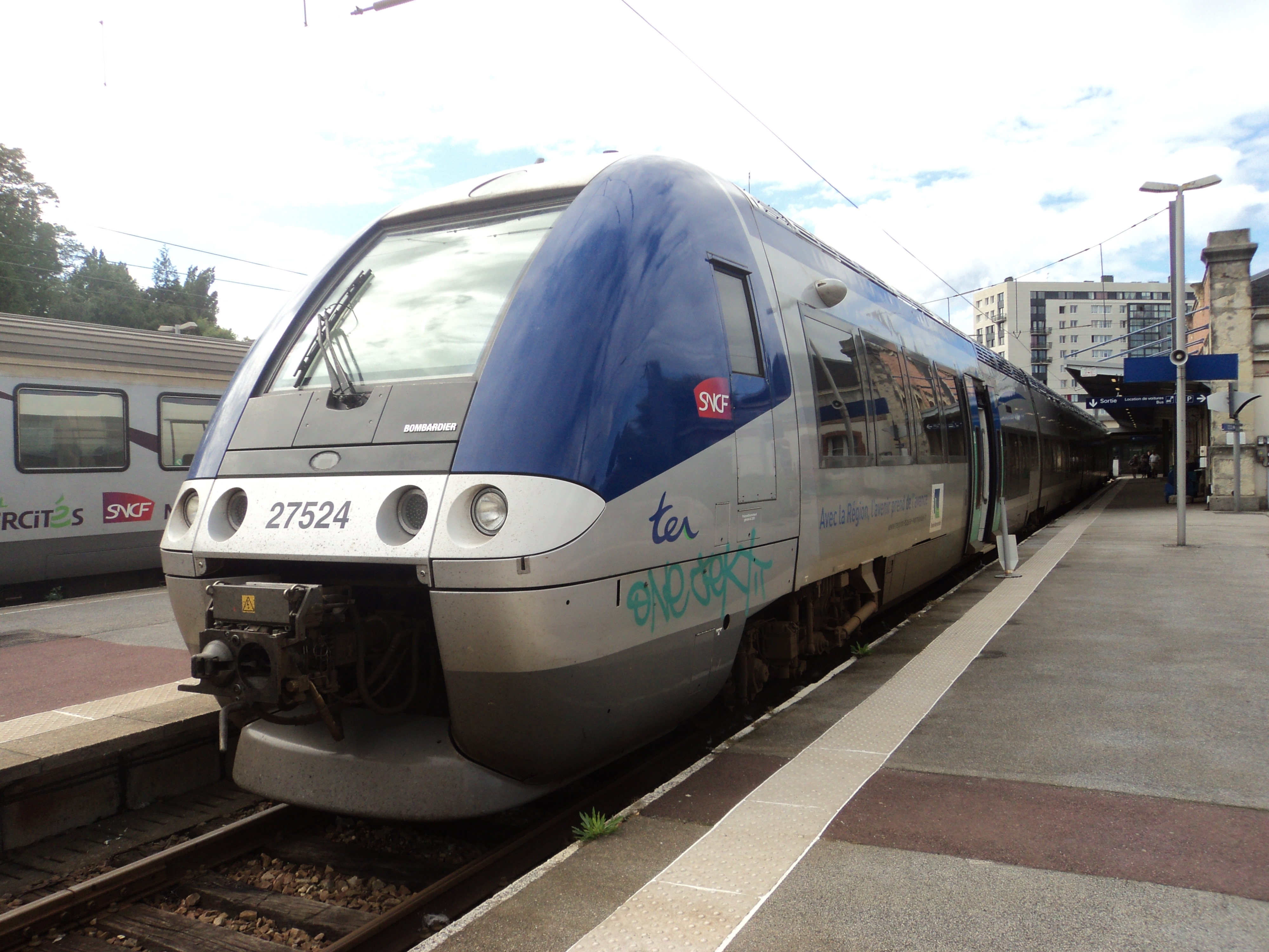 Z 27523/4 TER Basse-Normandie en gare de Cherbourg.